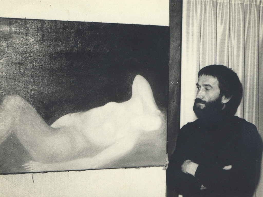 Josip Konta pored svojeg ulja na platnu, krajem 1970-ih